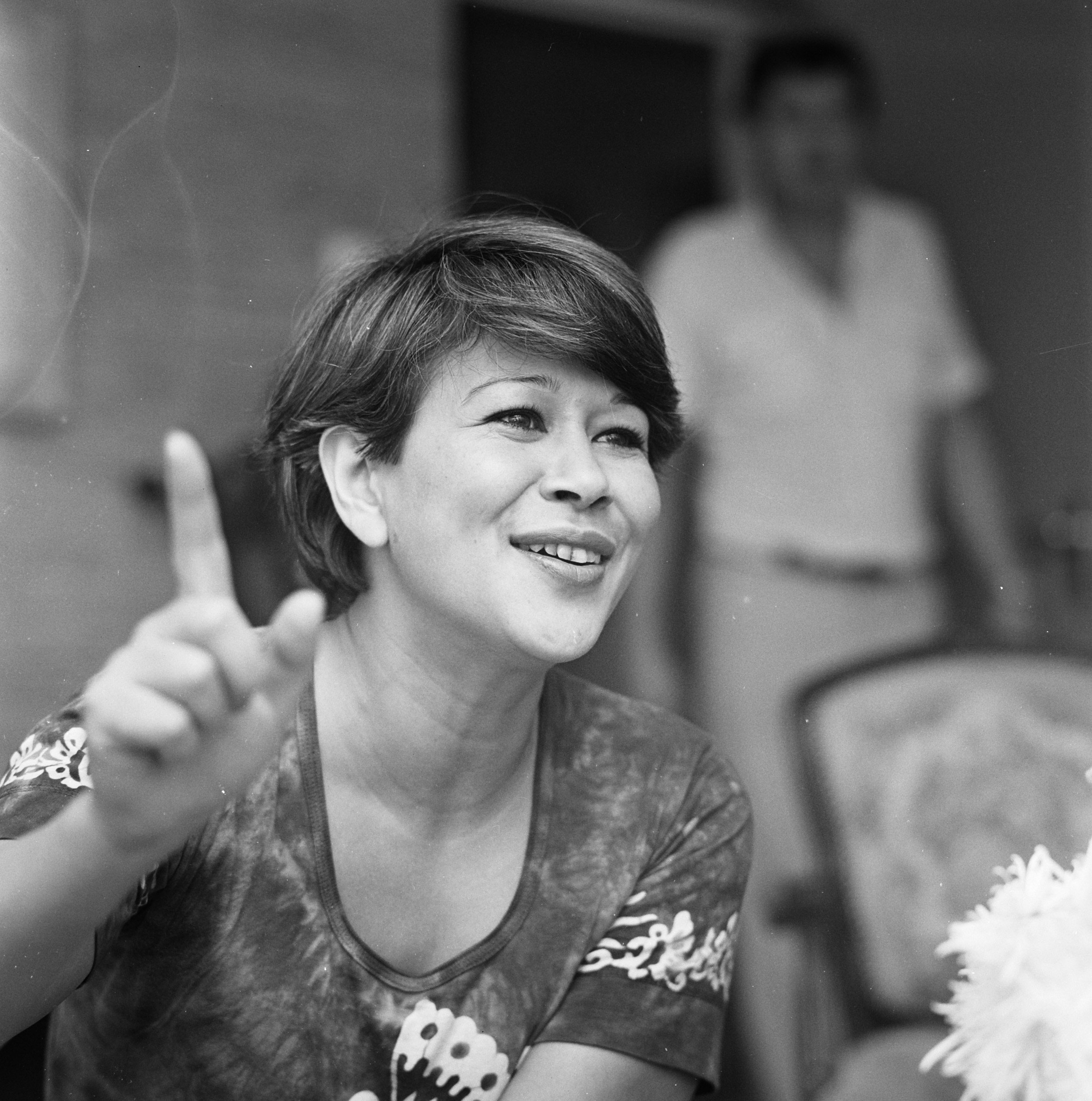 Collectie / Archief : Fotocollectie Anefo Reportage / Serie : Interview met de zangeres Anneke Grönloh Beschrijving : zangeressen, portretten, Grönloh, Anneke Datum : 2 augustus 1979 Trefwoorden : portretten, zangeressen Persoonsnaam : Grönloh, Anneke Instellingsnaam : Audet Fotograaf : Croes, Rob C. / Anefo Auteursrechthebbende : Nationaal Archief Materiaalsoort : Negatief (zwart/wit) Nummer archiefinventaris : bekijk toegang 2.24.01.03 Bestanddeelnummer : 930-3837